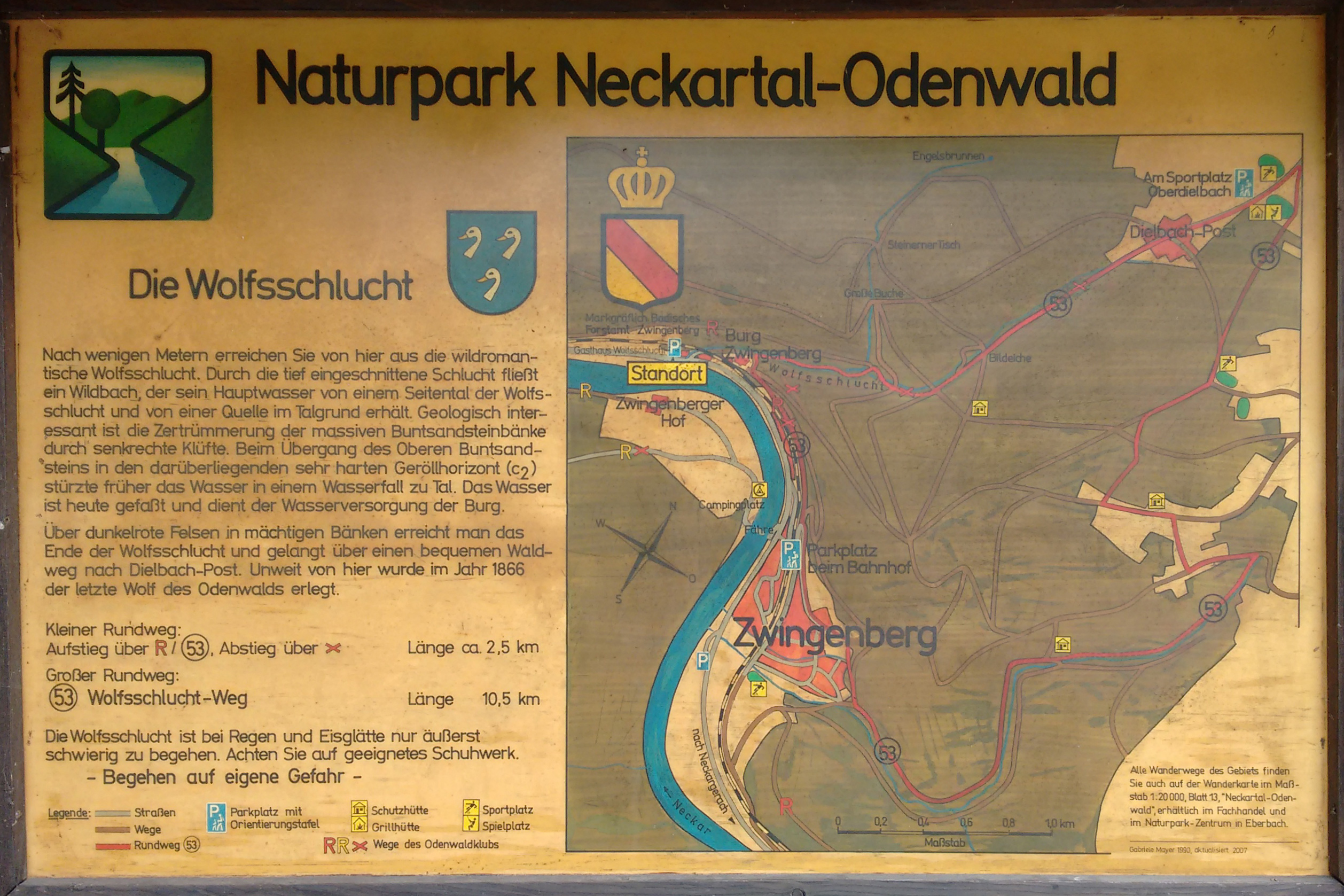 Infotafel mit Wanderkarte zur Wolfsschlucht an der B37 bei Zwingenberg (Baden)